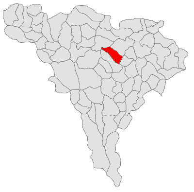 Categorie:Hărţi ale judeţului Alba